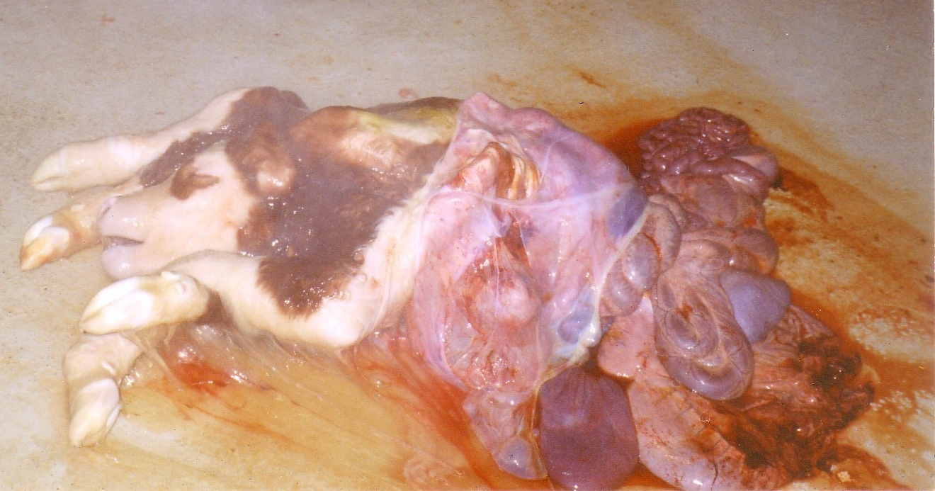 Eine Missbildung bei einem Kalb